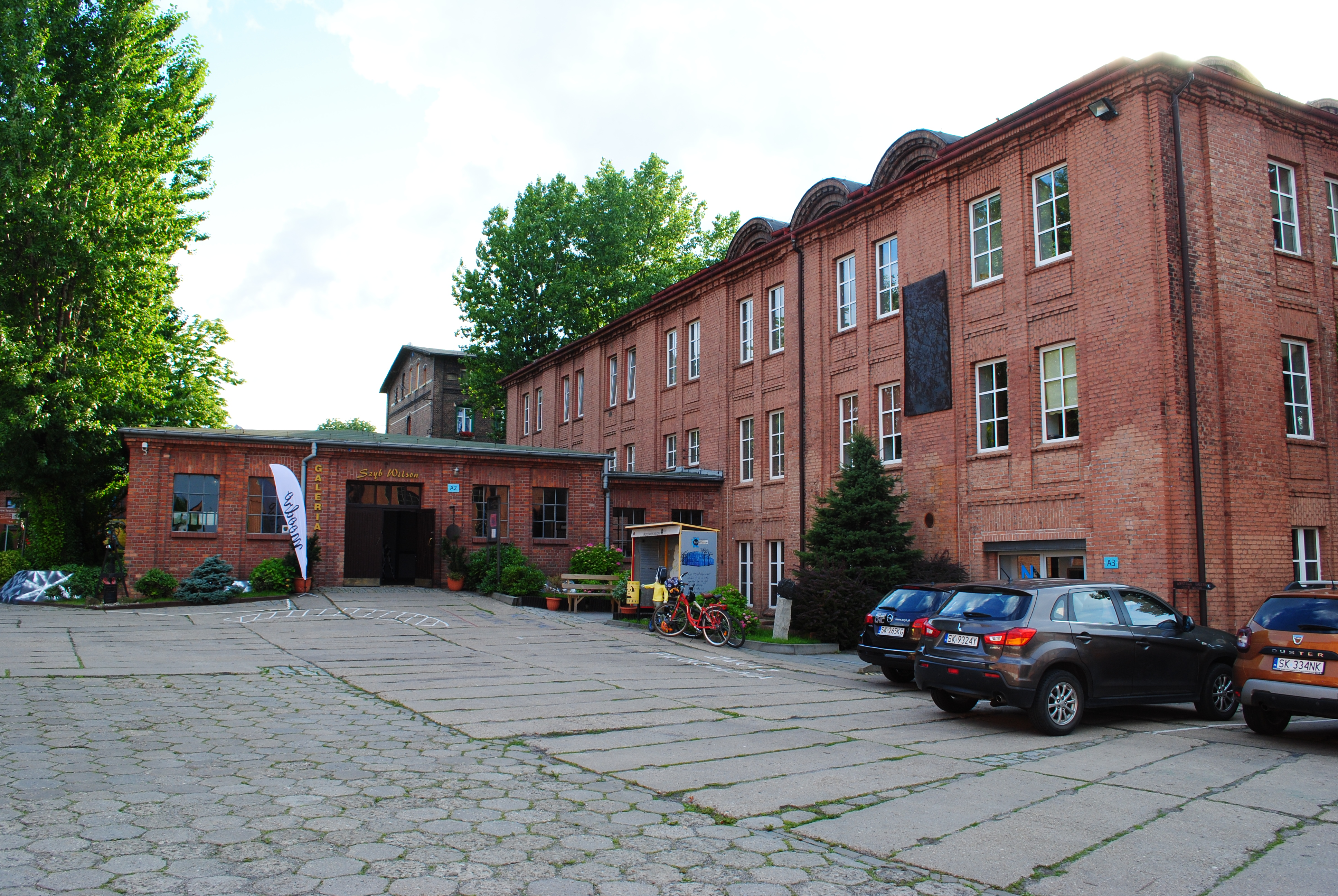 Katowice - Janów-Nikiszowiec. Galeria Szyb Wilson